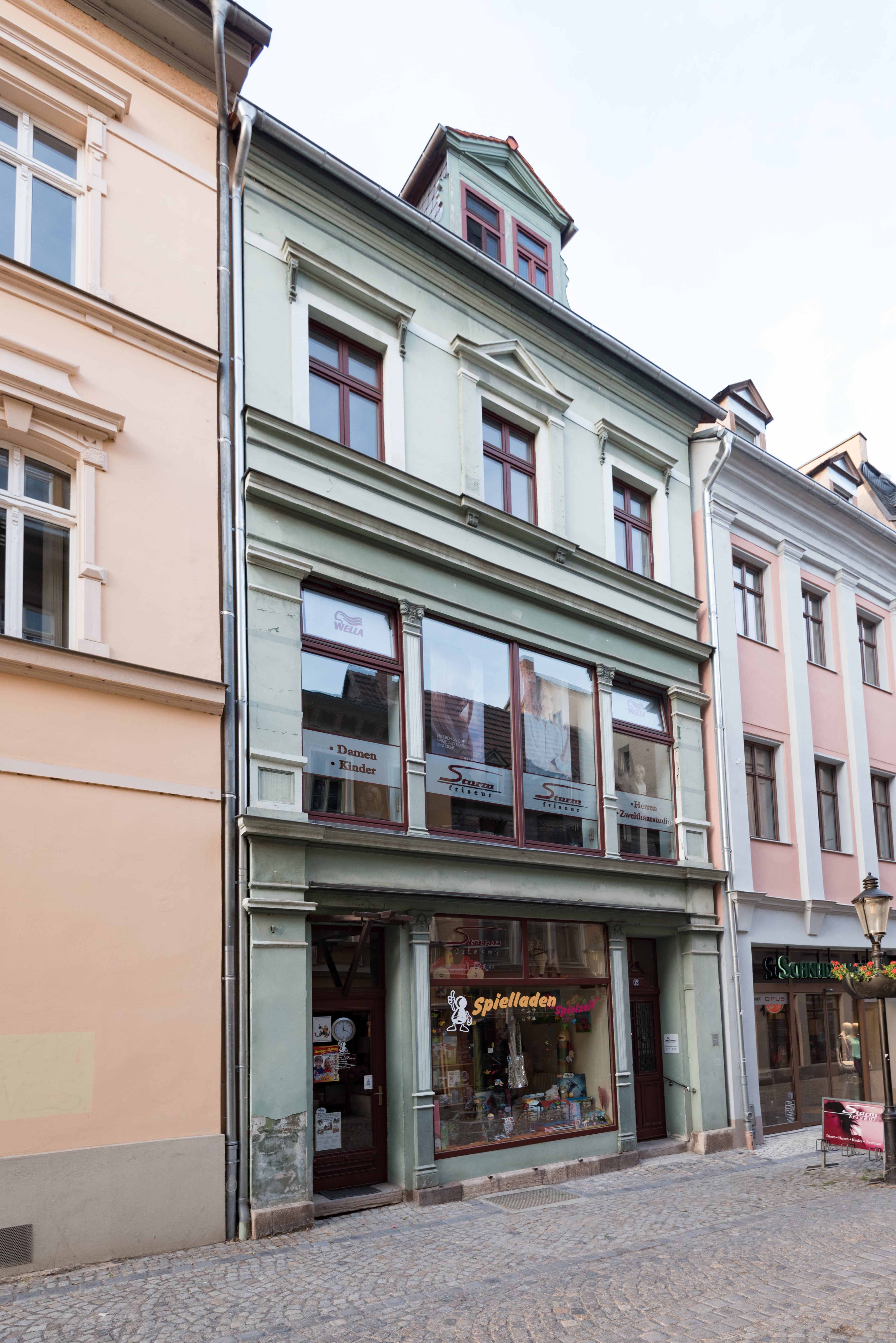 Naumburg (Saale), Herrenstraße 12